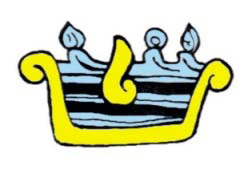 tlahuac